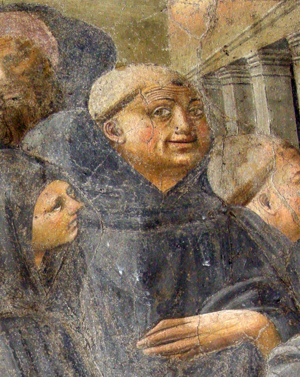 Chiostro degli aranci - Firenze